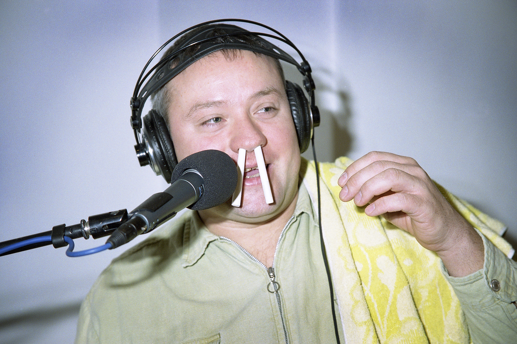 Märt Rannamäe skulptor Rait Pärg'i näituse avamisel 1999